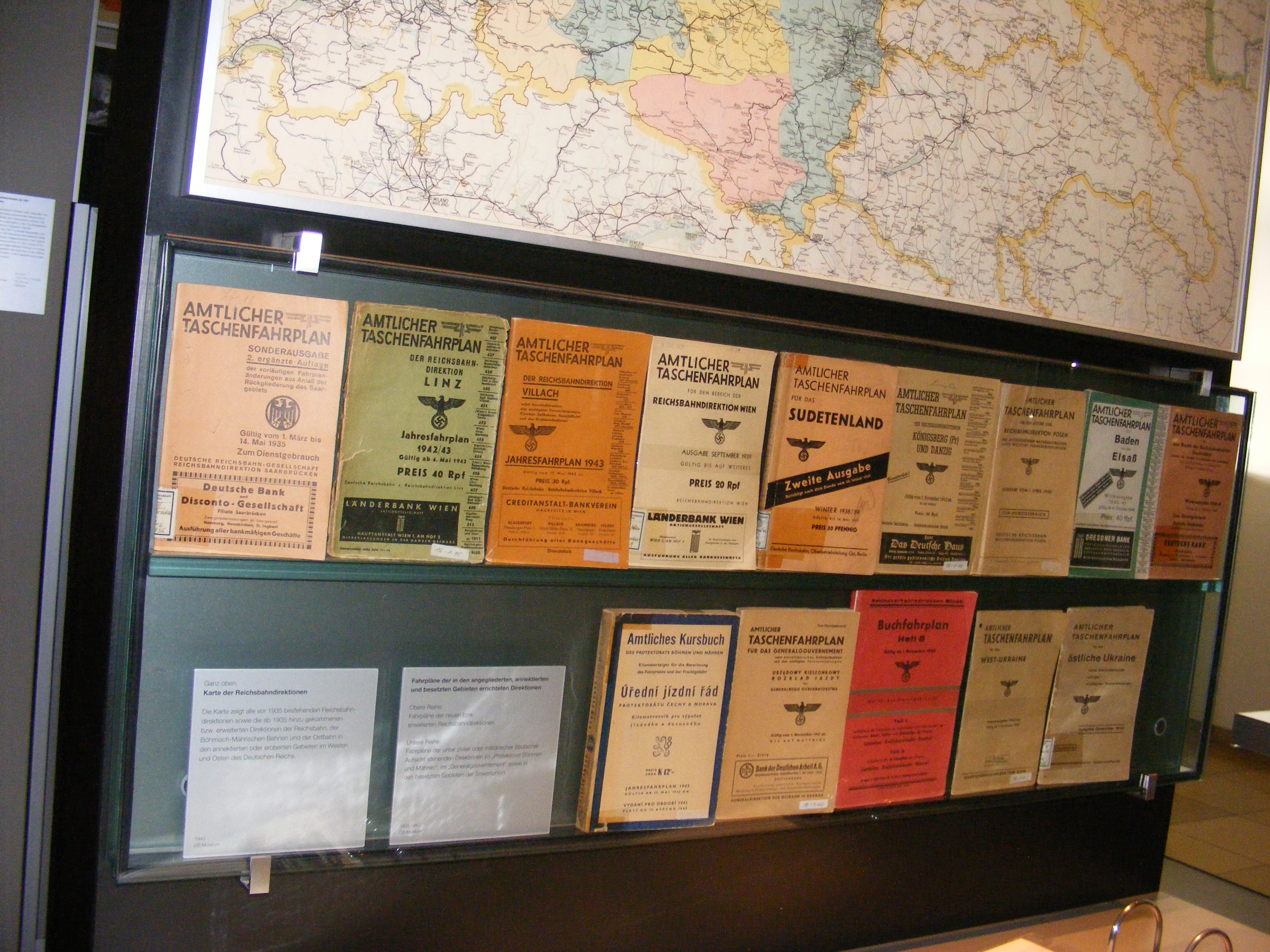 DB Museum Nürnberg